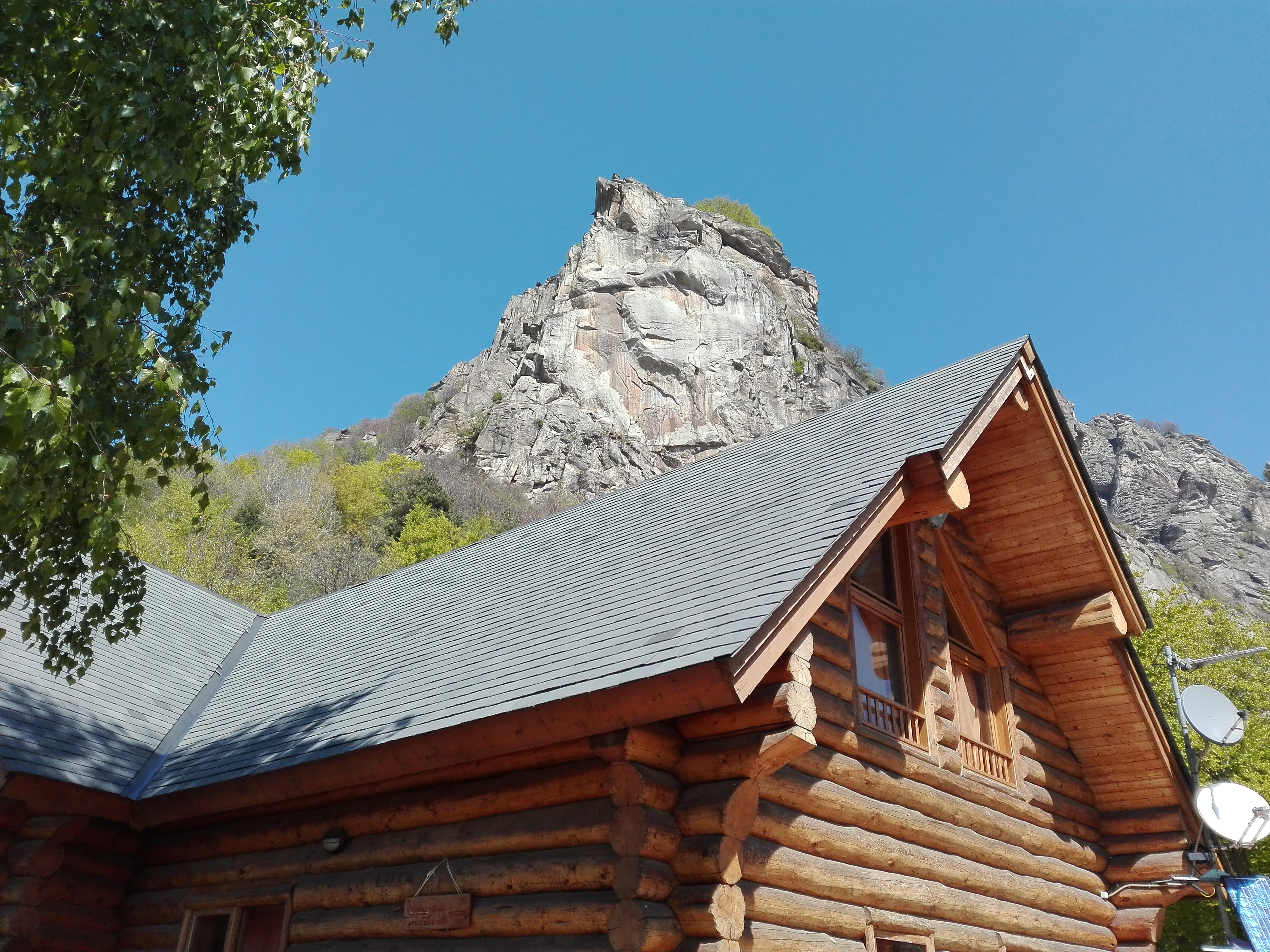 La Casa Canada con alle spalle la Rocca Sbarua. Pinerolese. Piemonte. Italia